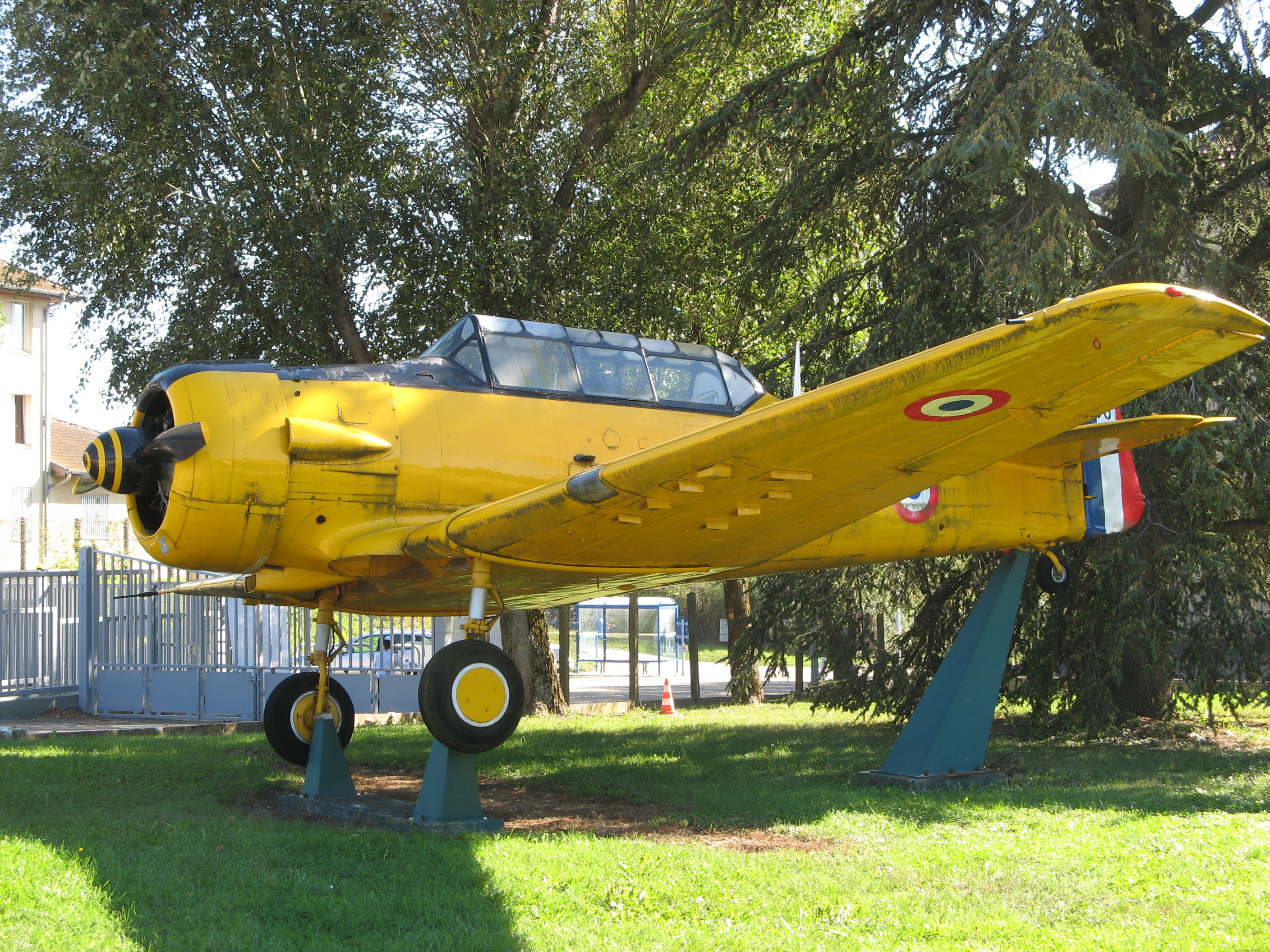 NA T-6G n° 5114688 présenté en stèle à l'entrée de la base.